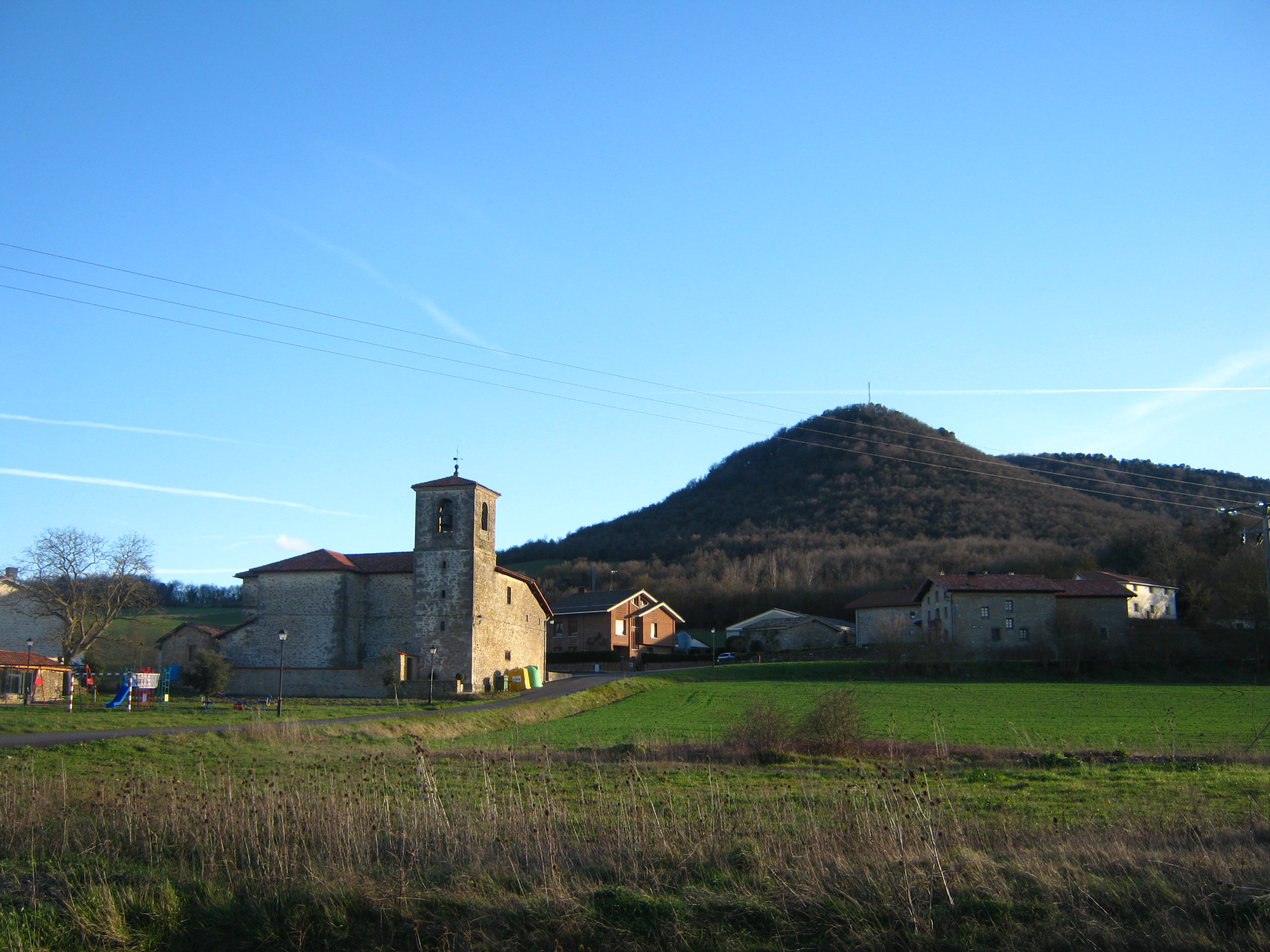 Panorámica de Gomecha (Álava, España)